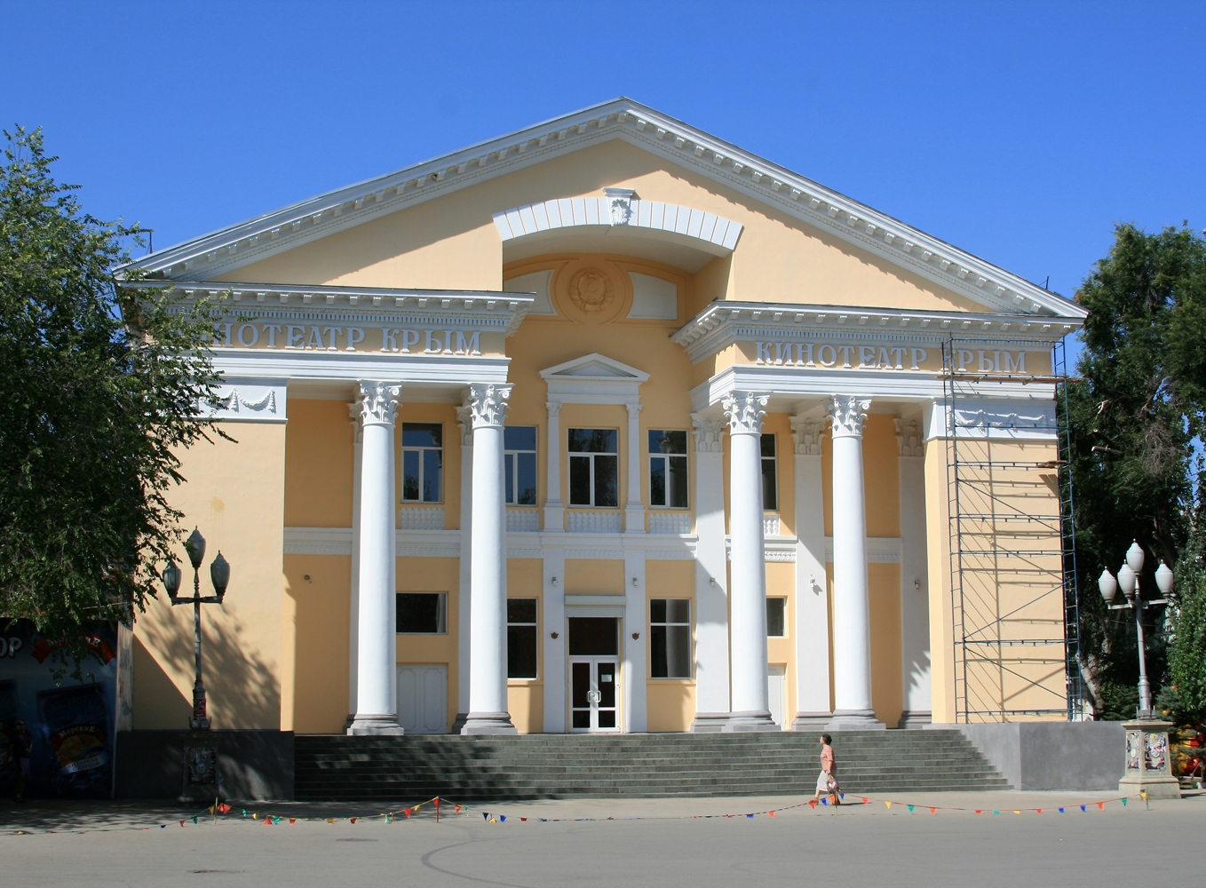 Kino Krim in Feodossija